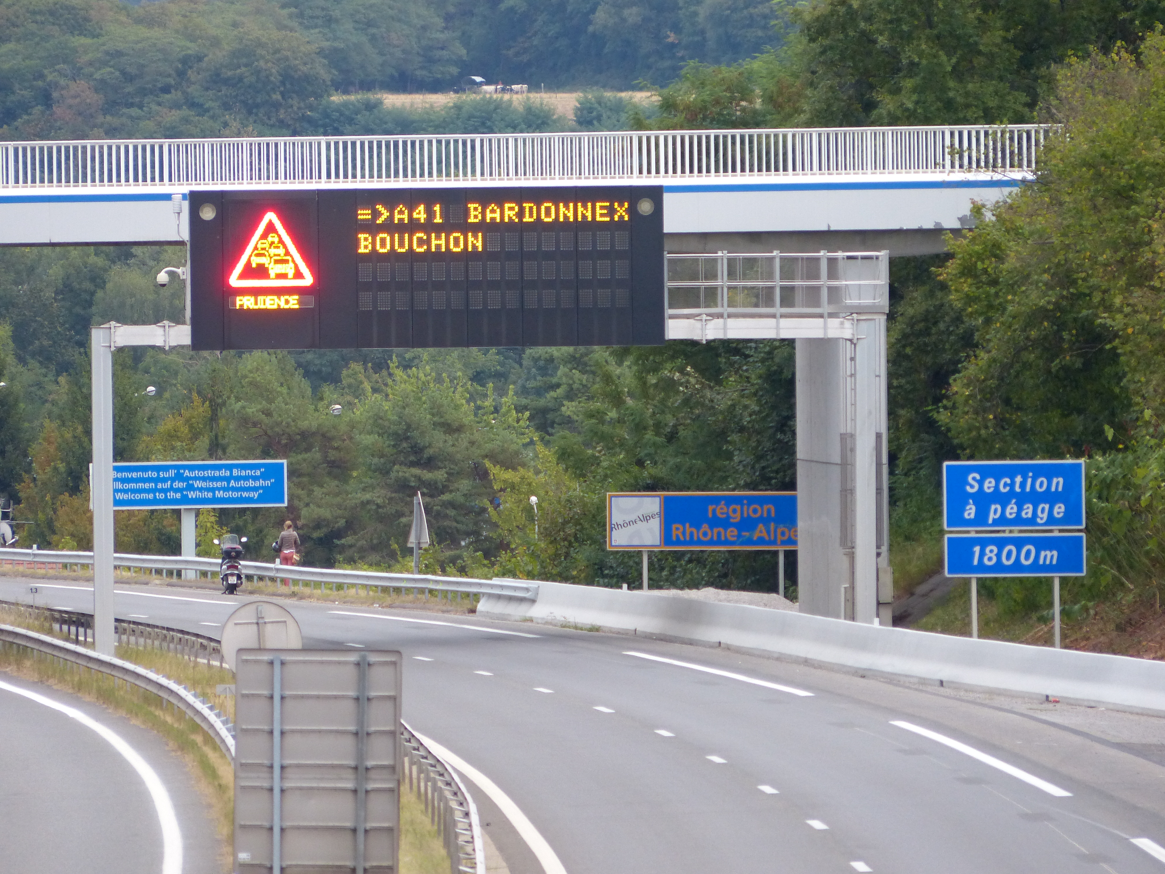 Panneaux D47a, PMV, XAK30, XM9z et E36b, sur l'A411 à Gaillard, Haute-Savoie.